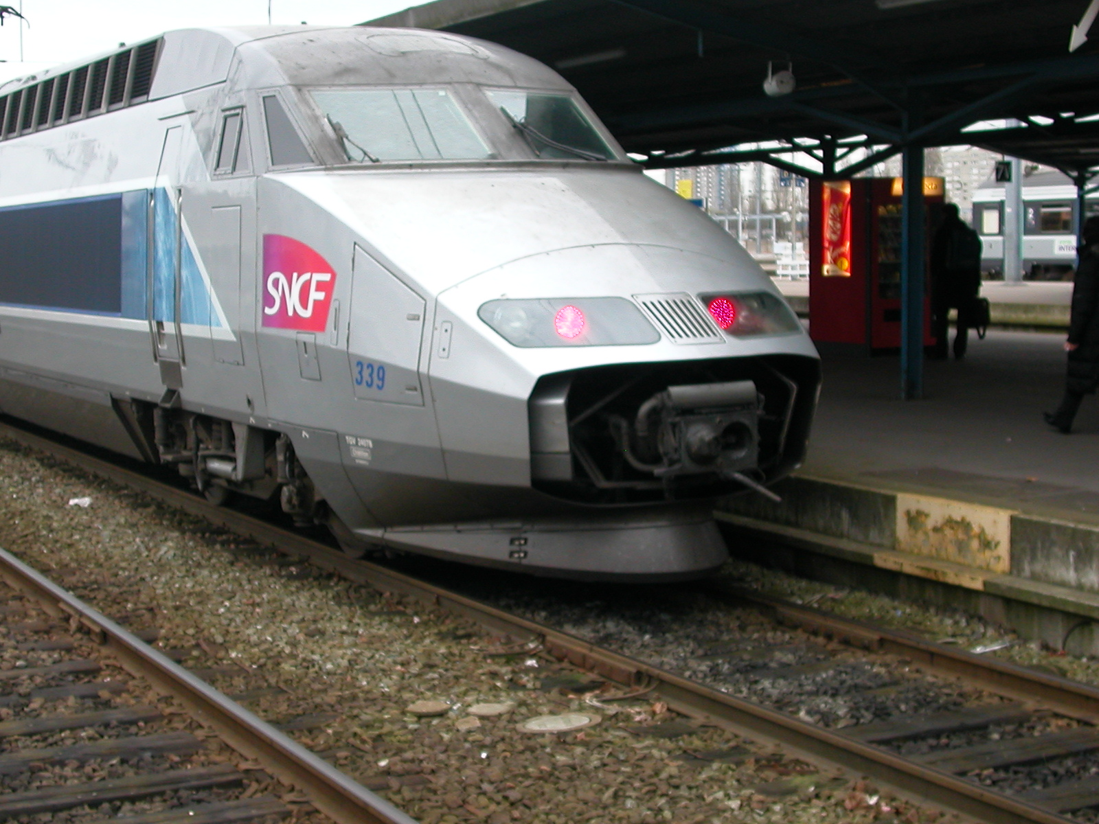 Nez d'un rame TGV Atlantique ouvert pour permettre l'accouplement de deux rames. Photo prise en gare de Nantes.